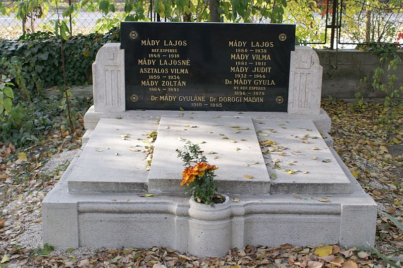 Mády Lajos (Sárközújlak (ma: Románia), 1848.08.05. - Újpest, 1918.01.01.) lelkész, Újpest első református lelkipásztorának és Mády Gyula (Újpest, 1896.08.15. - Budapest (Újpest), 1978.04.30.) lelkész, az újpesti református gyülekezeti ház alapítójának sírja Budapesten. Megyeri temető: kriptasor-1-35/36.